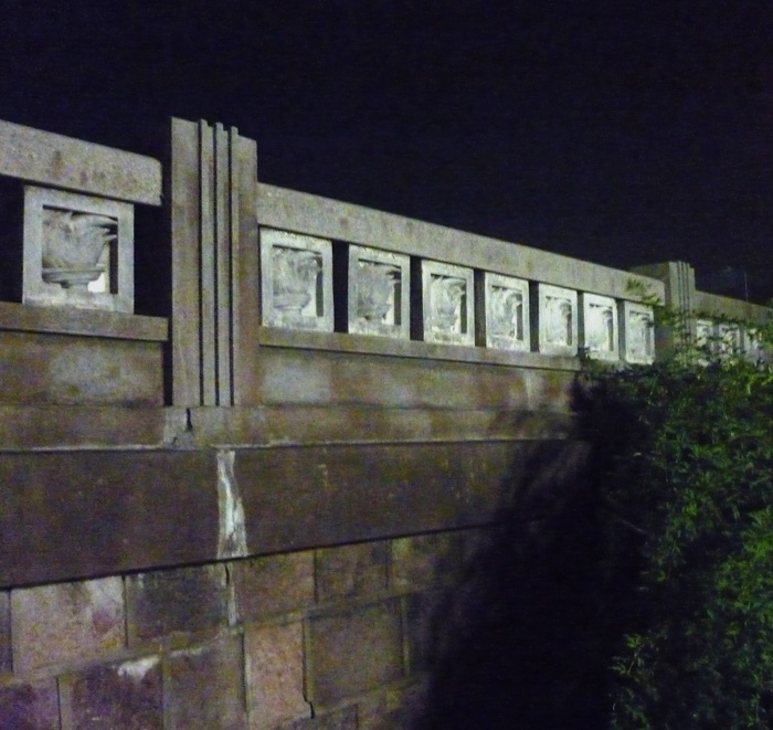 宁波新江桥老桥